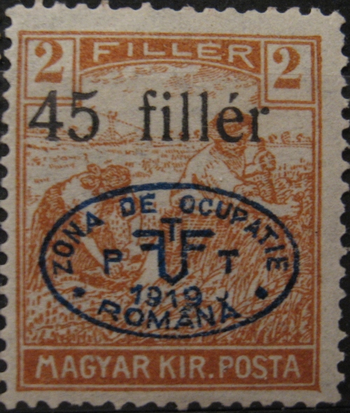 Marcă poştală emisă la Debreţin de administraţia română din Ungaria la începutul anului 1919. Supratipar cu inscripţia "ZONA DE OCUPAŢIE ROMÂNĂ" aplicat peste mărci poştale ungureşti. Aceste mărci au circulat preponderent în Câmpia Tisei.